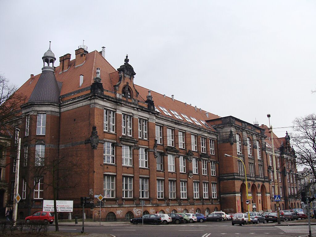 Szczecin, ul. Pułaskiego 10 - dawna biblioteka Politechniki Szczecińskiej, obecnie Instytut Technologii Chemicznej Nieorganicznej i Inżynierii Środowiska ZUT (zabytek nr 1283)